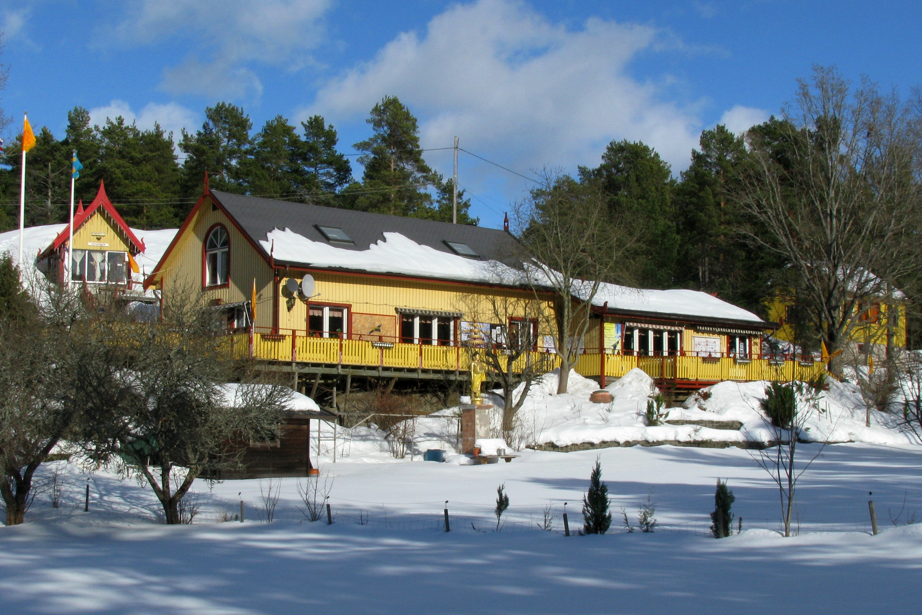 Buddharamatemplet i Torsby i Värmdö kommun. Källa: eget foto, fotograf EnDumEn 16 mars 2010